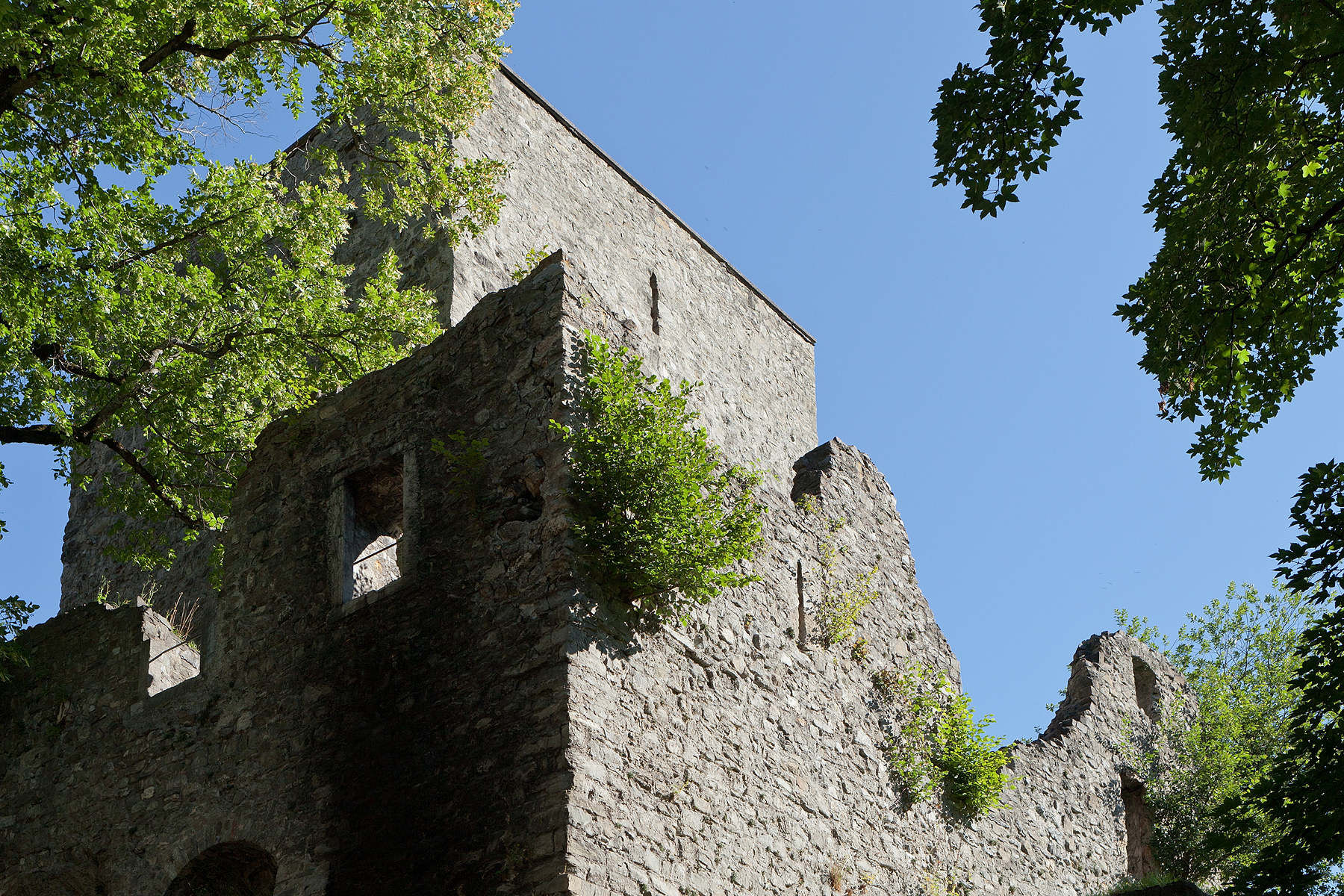 Burgruine Tellenburg in Frutigen (BE)